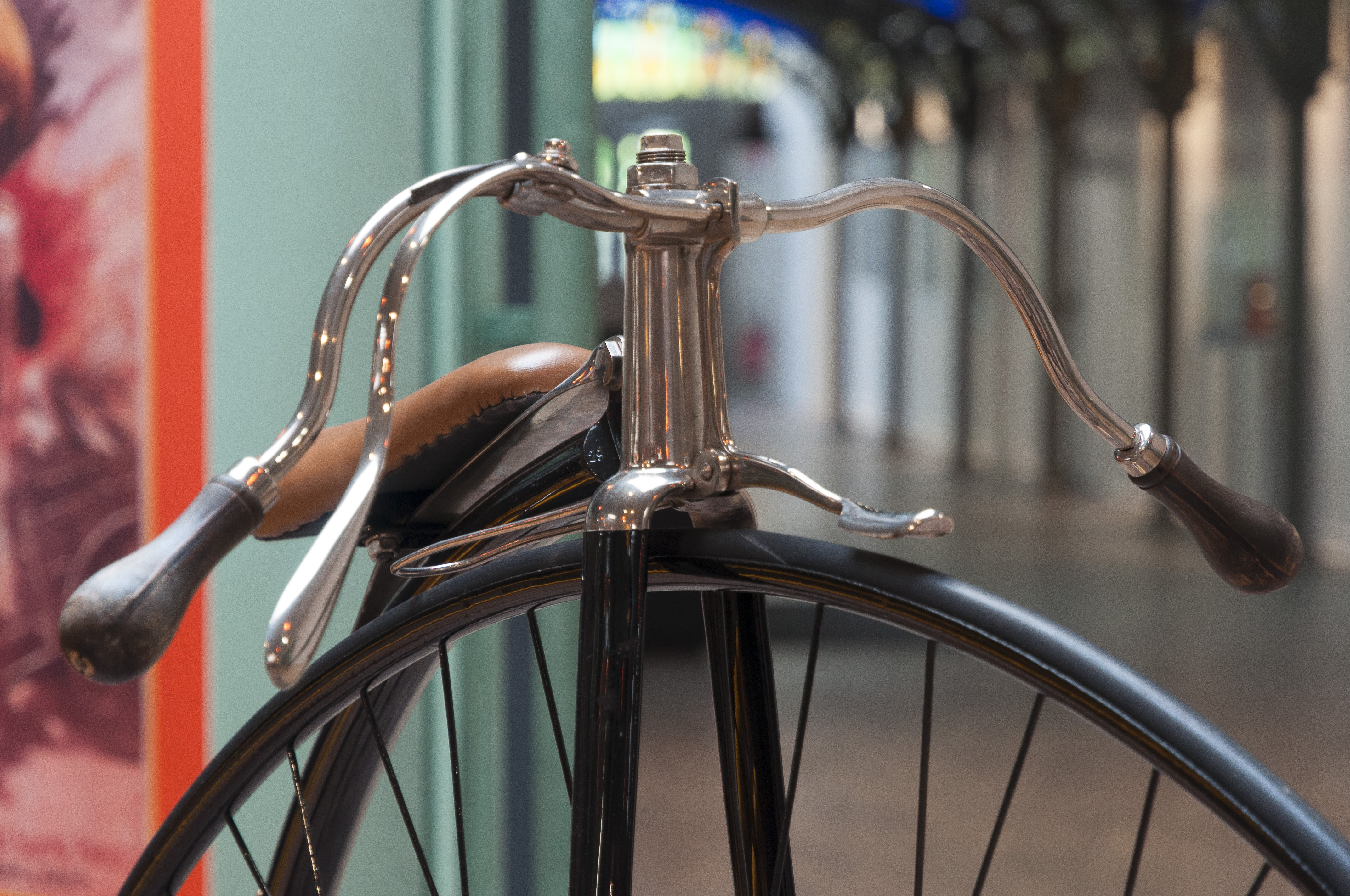 Guidon,fourche et selle du Grand-bi photographié au Musée de l'Aventure Peugeot.